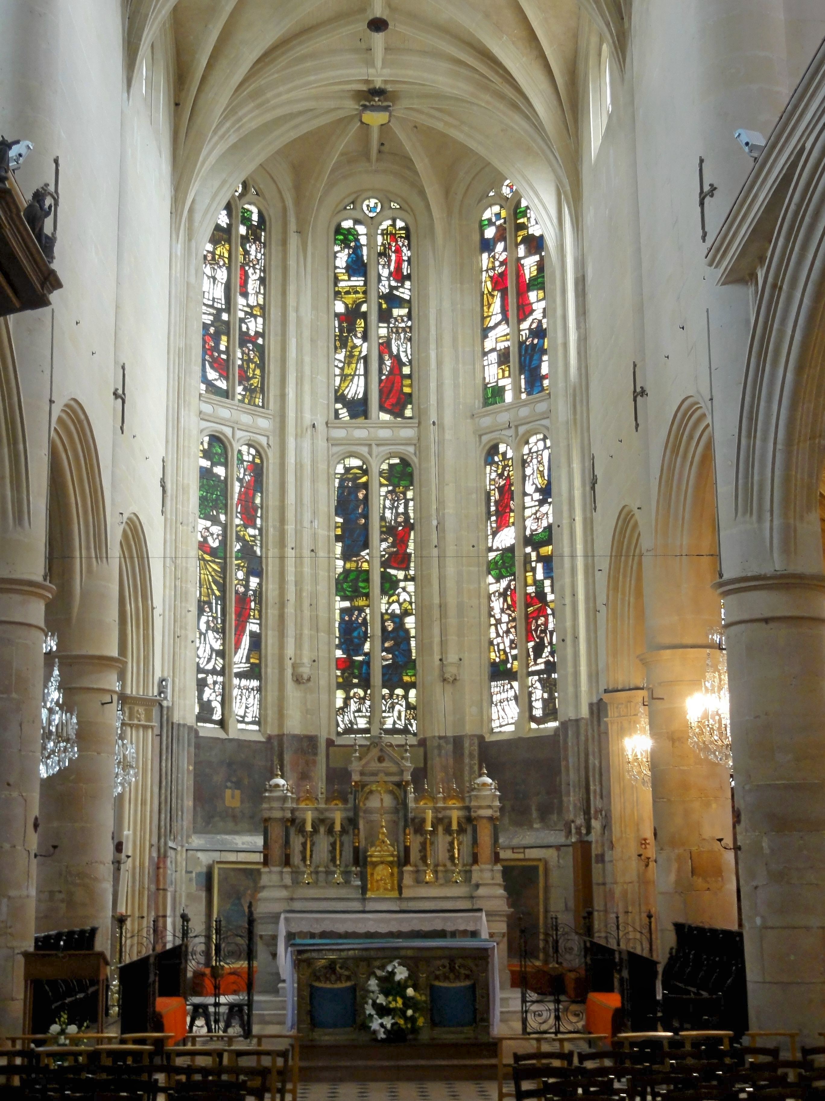 Chœur.